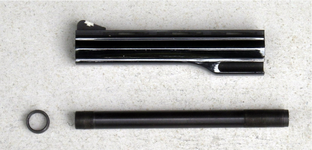 Dab Wesson Wechsel-Laufsystem